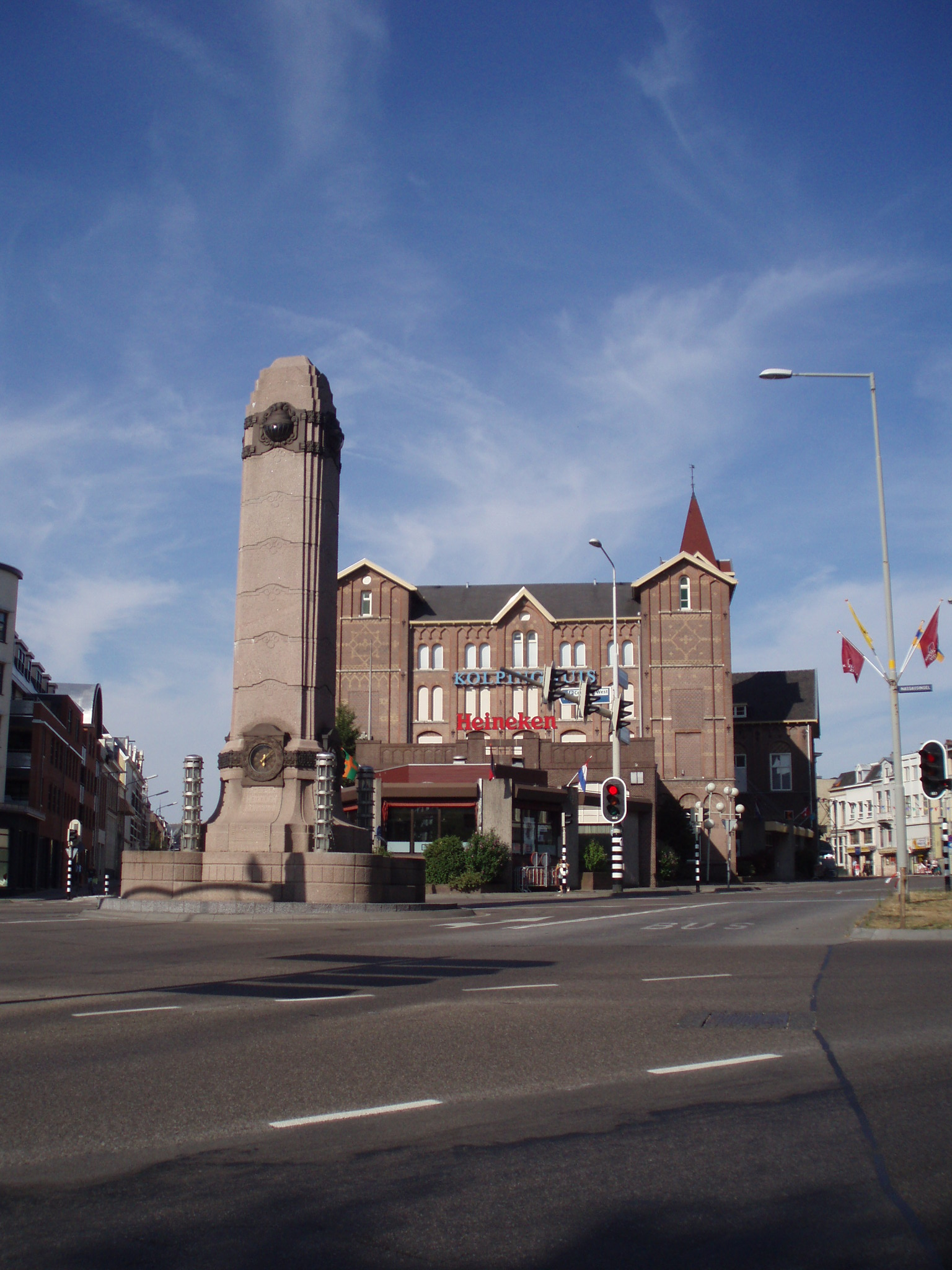 Quack-monument and Kolpinghuis in Nijmegen, Netherlands (c) 2006 Looi